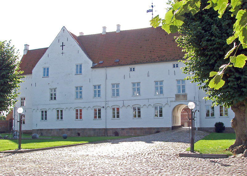 Tjele gods, hovedbygningen. Den ligger i Tjele Sogn, Sønderlyng Herred, Viborg Amt, Denmark